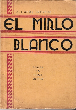 EL MIRLO BLANCO. JLA